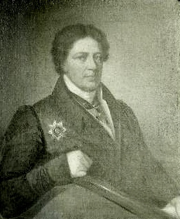 Berend Johann von Uexküll (1762–1827)